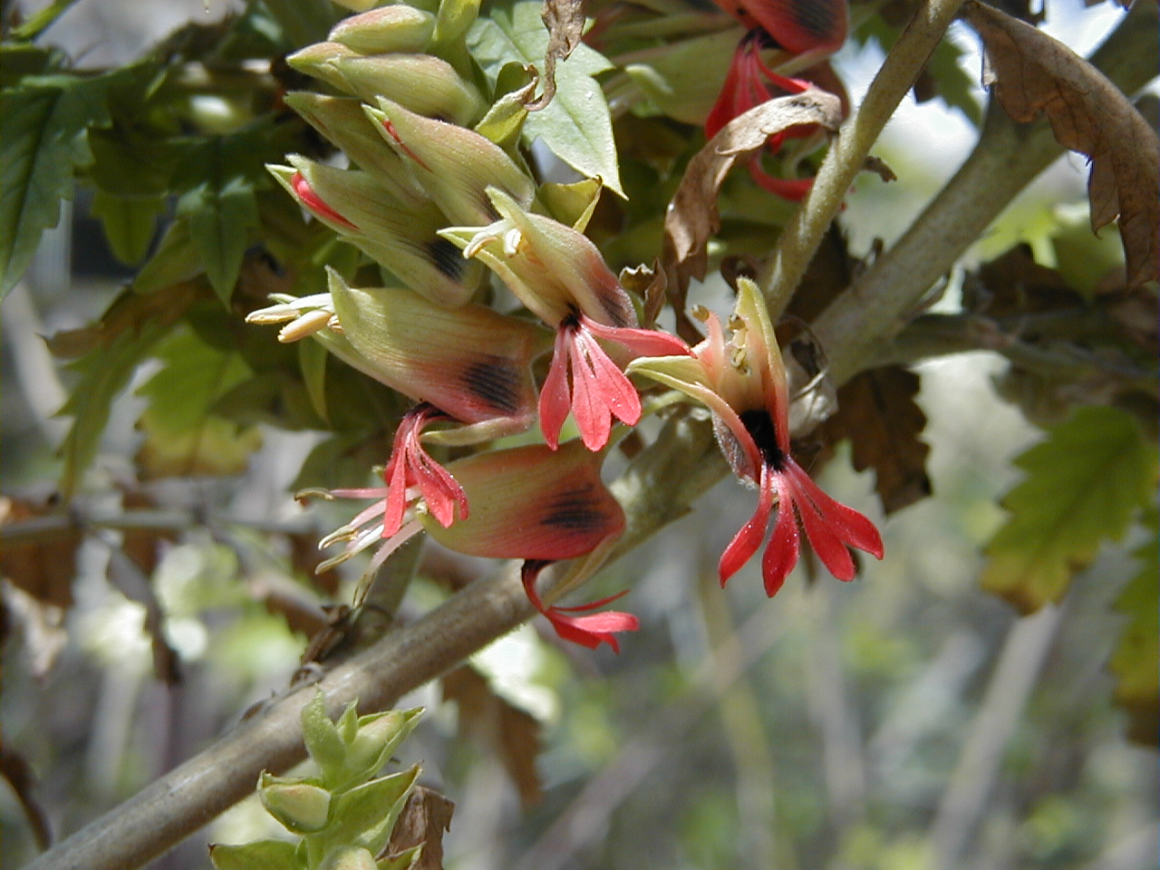 Melianthus comosus. Real Jardín Botánico, Madrid.